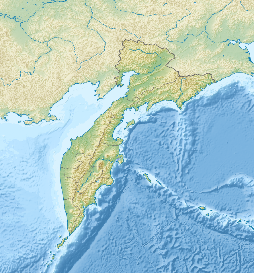 Физическая карта Камчатского края, Россия. Координаты для GMT: -R148.26/179.26/48.27/67.73 Инструменты: GMT, Inkscape